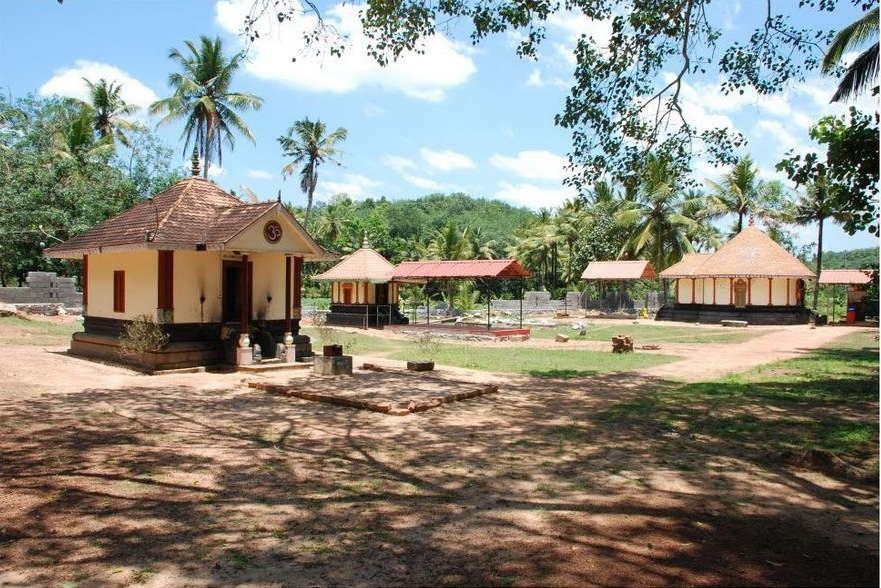 ഇരു ക്ഷേത്രങ്ങളും ഒരു ചിത്രത്തിൽ